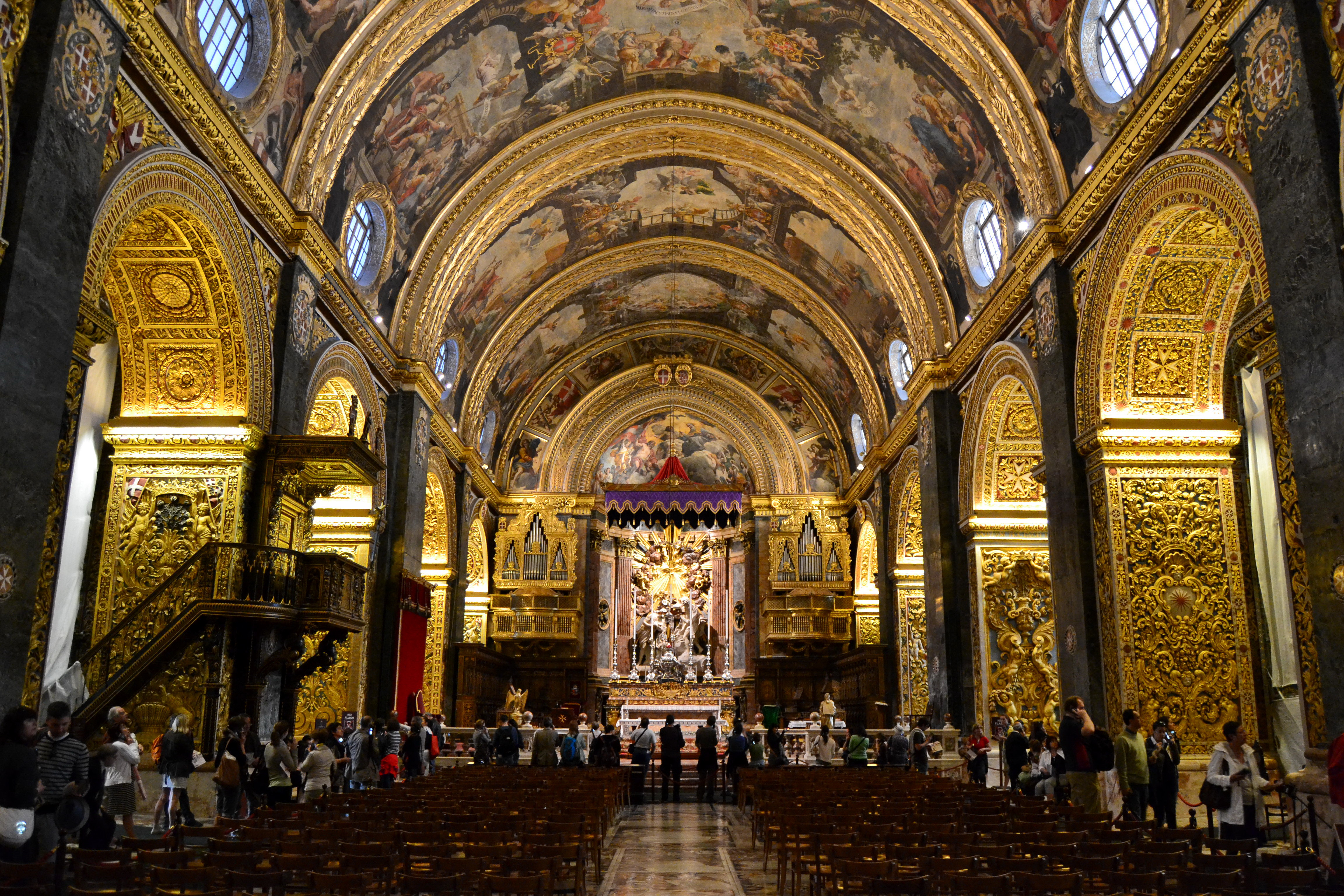 Nef de la co-cathédrale Saint-Jean à La Valette, Malte